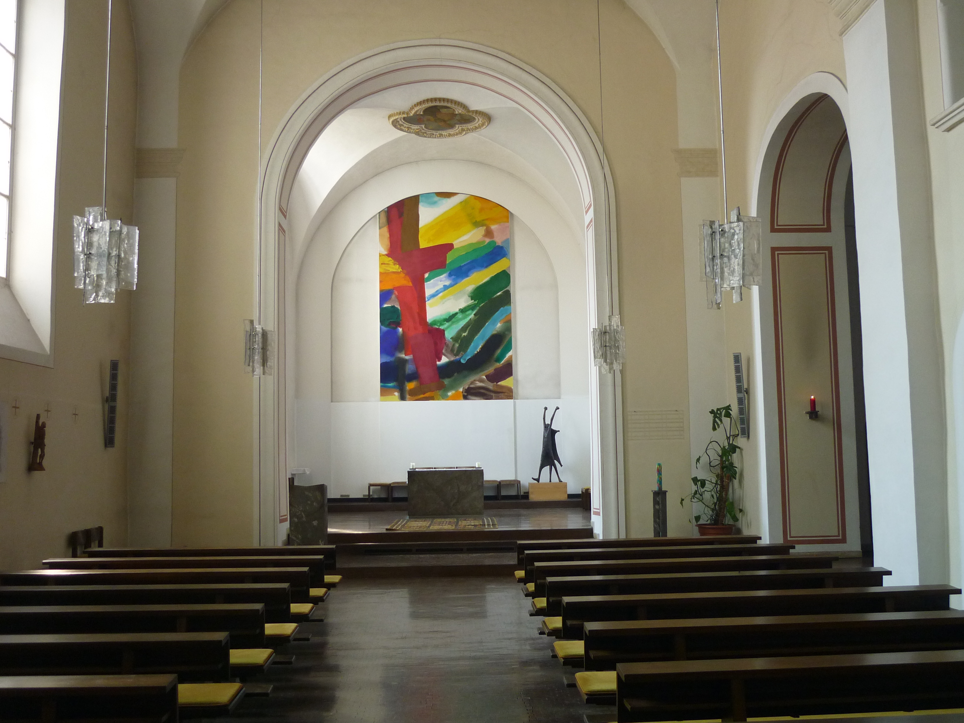 Stiegenkirche, Graz - Innenraum